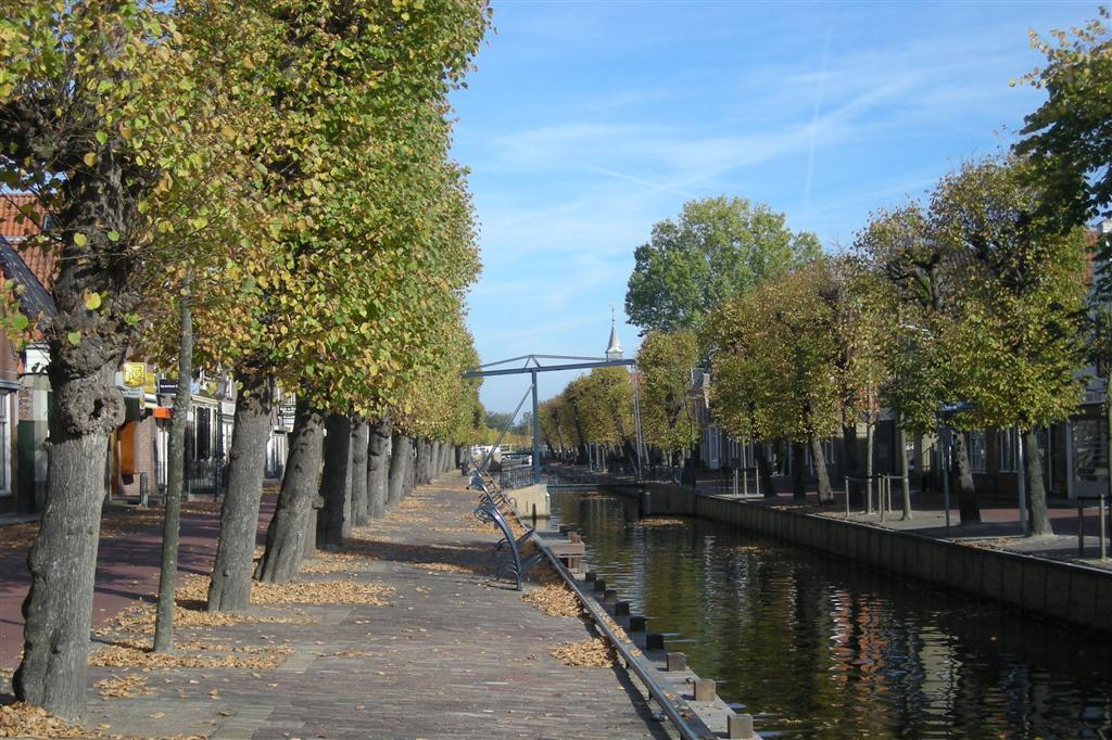 Balk (plaats in de gemeente De Friese Meren)